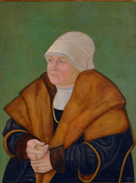 Anna van Eppstein-Köningstein